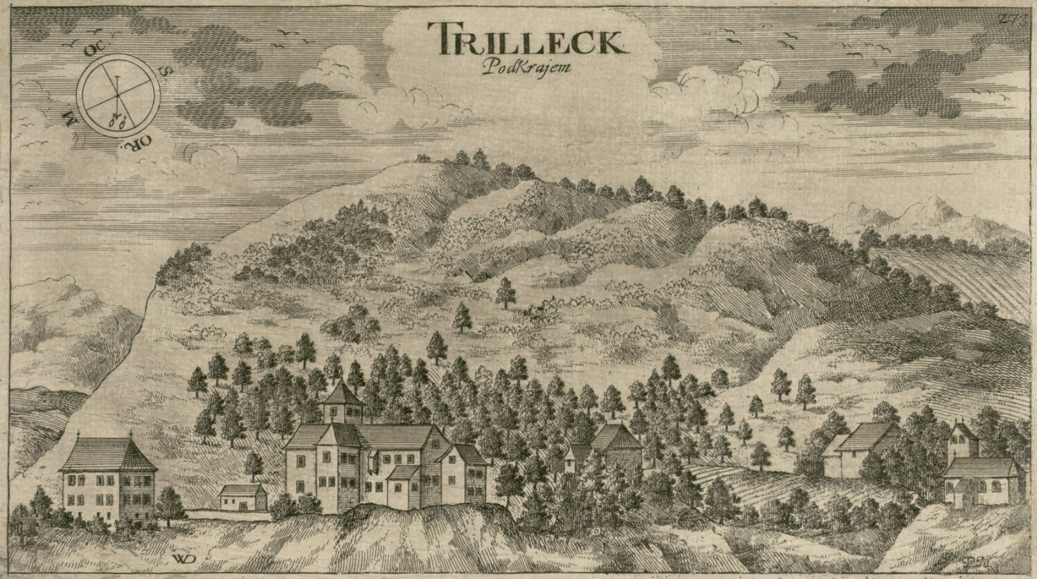 Grad Trilek